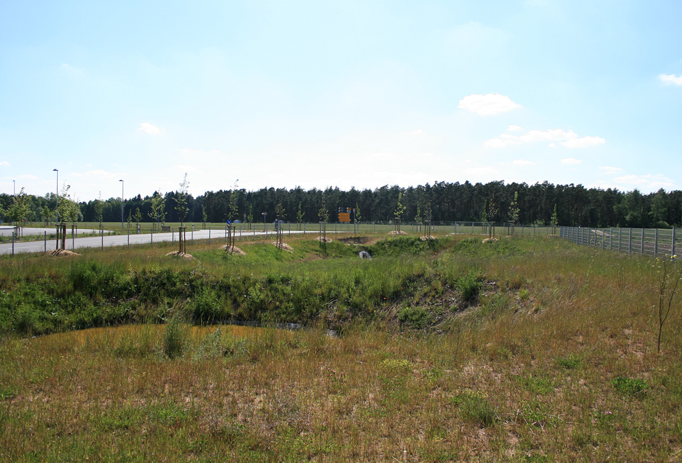 Ökologische Ausgleichsfläche an der SFS Nürnberg - Ingolstadt, am Bahnhof Allersberg